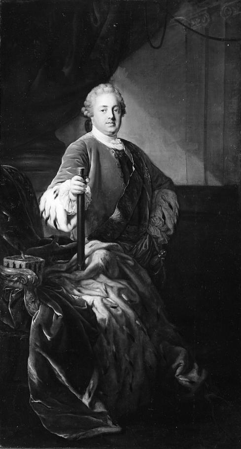 Friedrich Christian, Kurfürst von Sachsen (1722-1763)